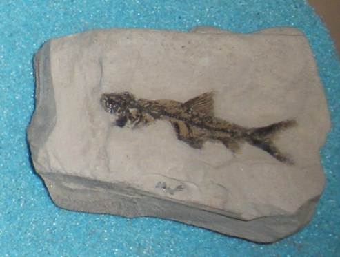 Fossil of Lepidotes, an extinct fish Took the photo at Musee d'Histoire Naturelle, Brussels